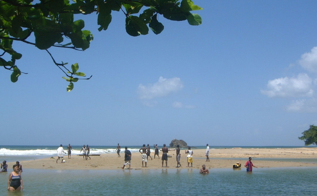 my image